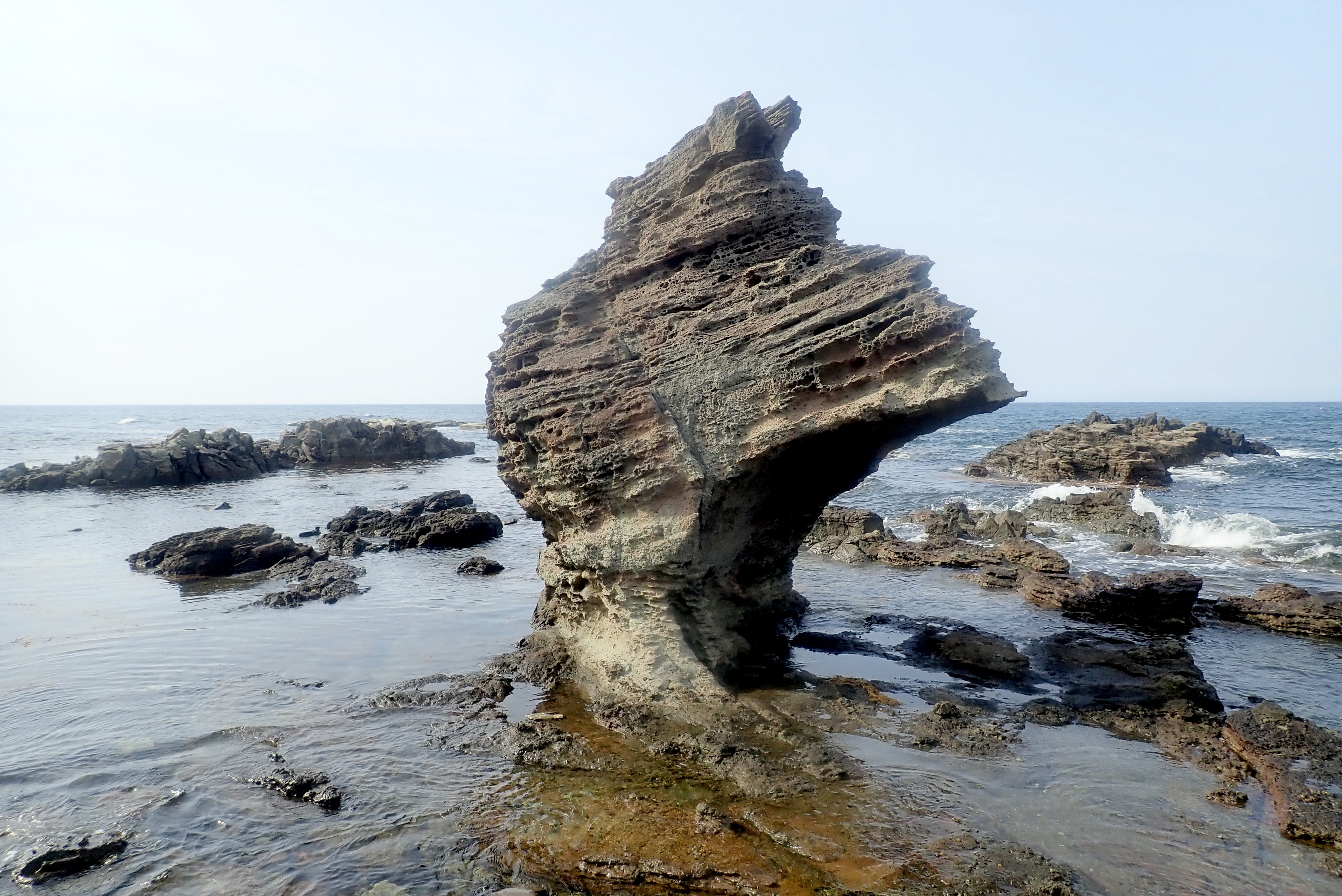 日本国,青森県,西津軽郡,深浦町,千畳敷,奇岩群,かぶと岩